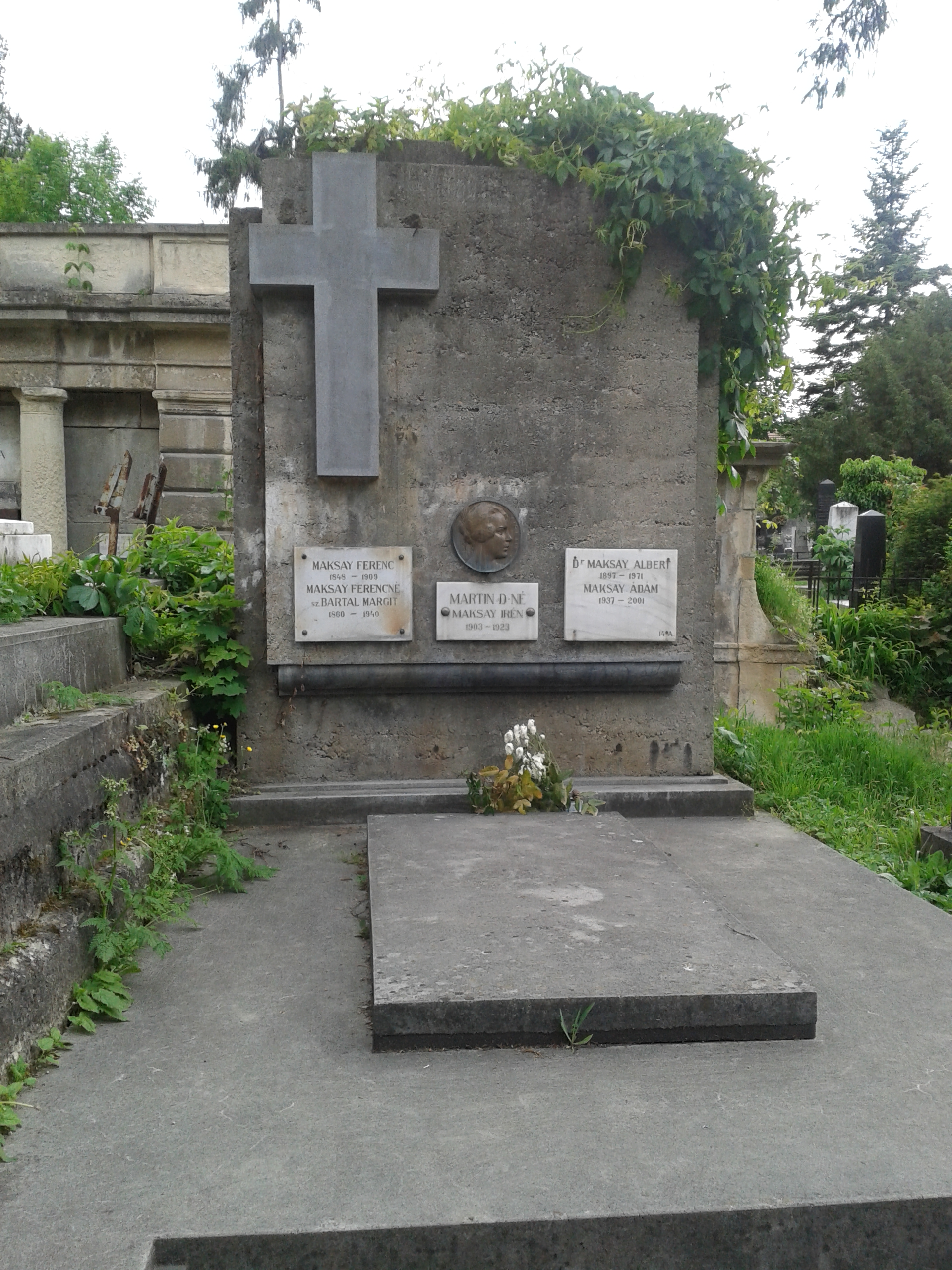 Cimitirul Central "Hajongard" Cluj Napoca Mormântul familiei Maksay şi basorelieful lui Martin D-né născută Maksay Irén.